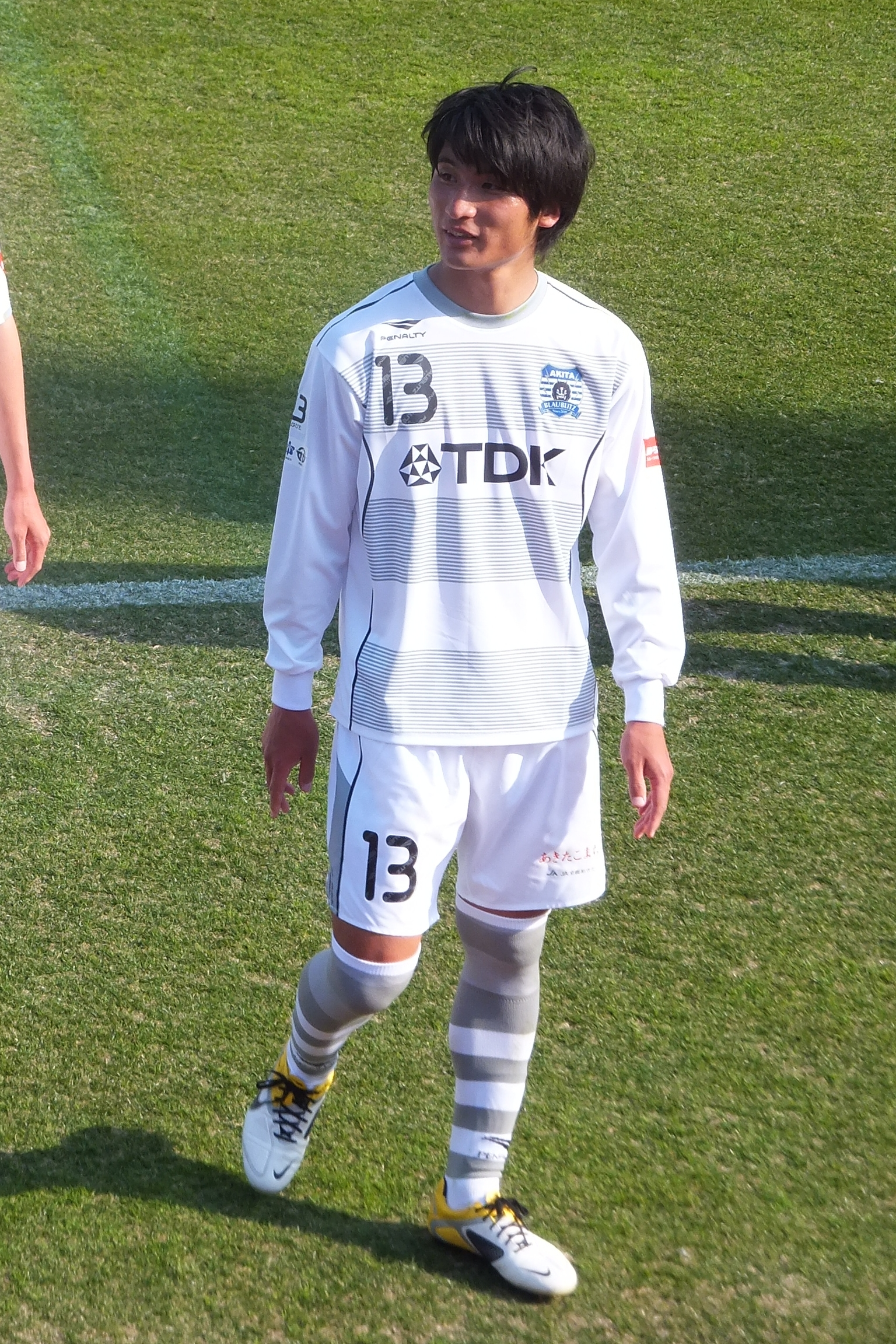 ブラウブリッツ秋田、#13 新里彰平（MF）。2014年3月9日、J3リーグ開幕戦、YSCC対ブラウブリッツ秋田戦（ニッパツ三ツ沢球技場）にて。